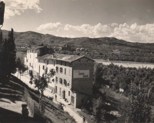 Una antica fotografia della pricipale strada di San Michele.